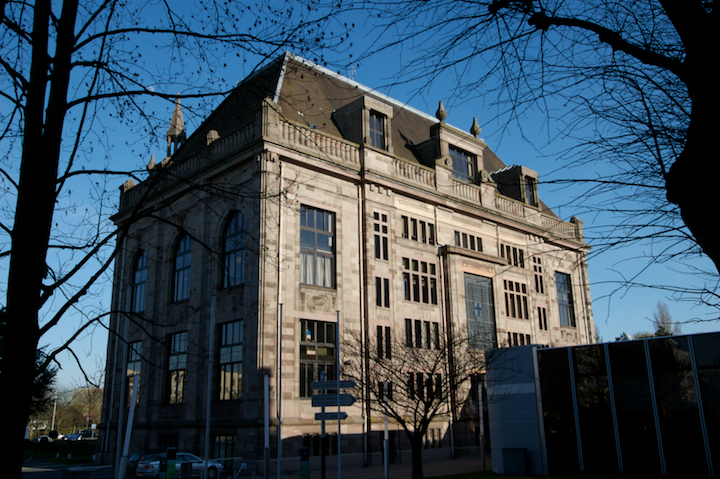 La mairie de Marcq-en-Baroeul